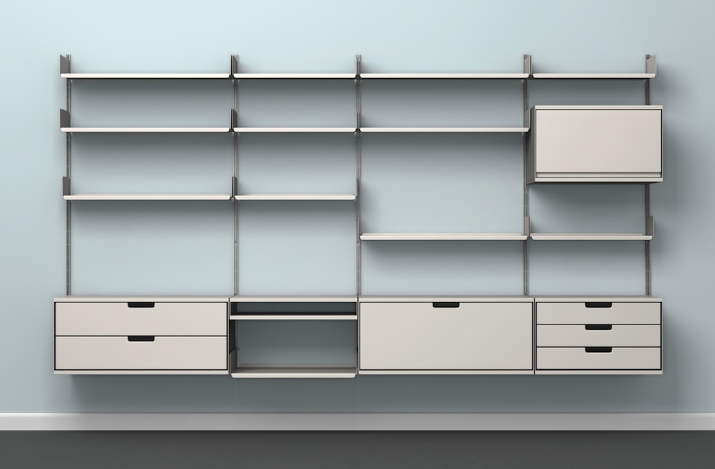 Vitsoe 606 Universal Shelving System